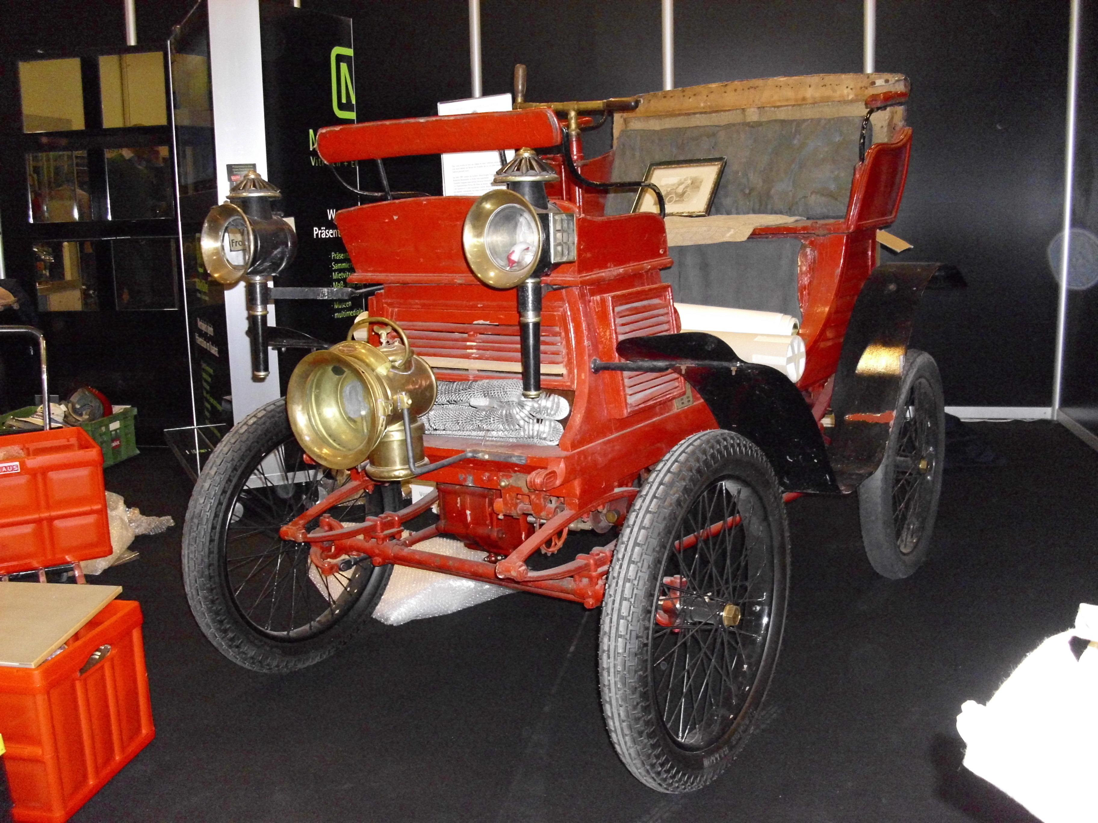 Kölner Motorenfabrik 1901